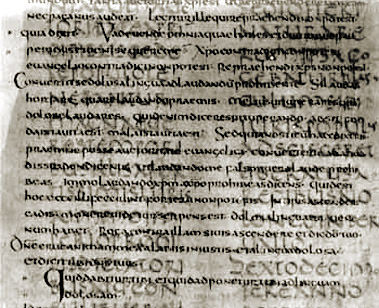 Palimpsest zawierający tekst De re publica spisany w V wieku. Minuskułą z VII wieku nadpisano na nim Komentarz do Psalmów Augustyna. Odkryty przez Angelo Mai w roku 1819. Najstarszy zachowany rękopis tekstu Cycerona.